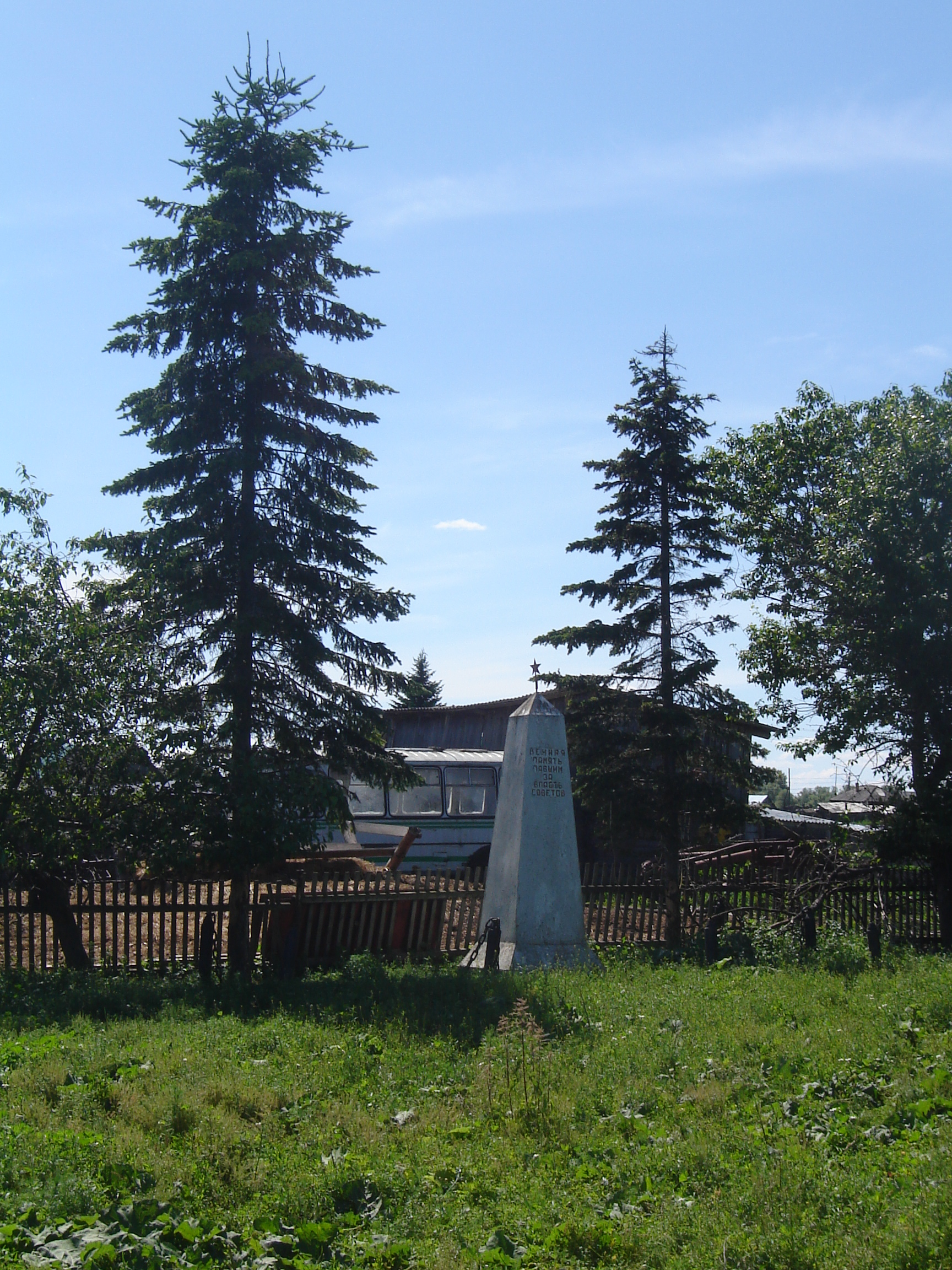 Обелиск павшим за власть Советов в годы Гражданской войны в деревне Верхнесидорово Ярковского района